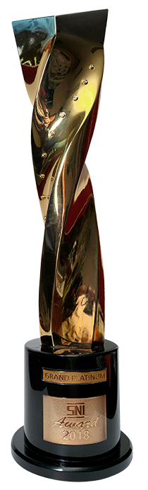 Piala Grand Platinum SNI Award